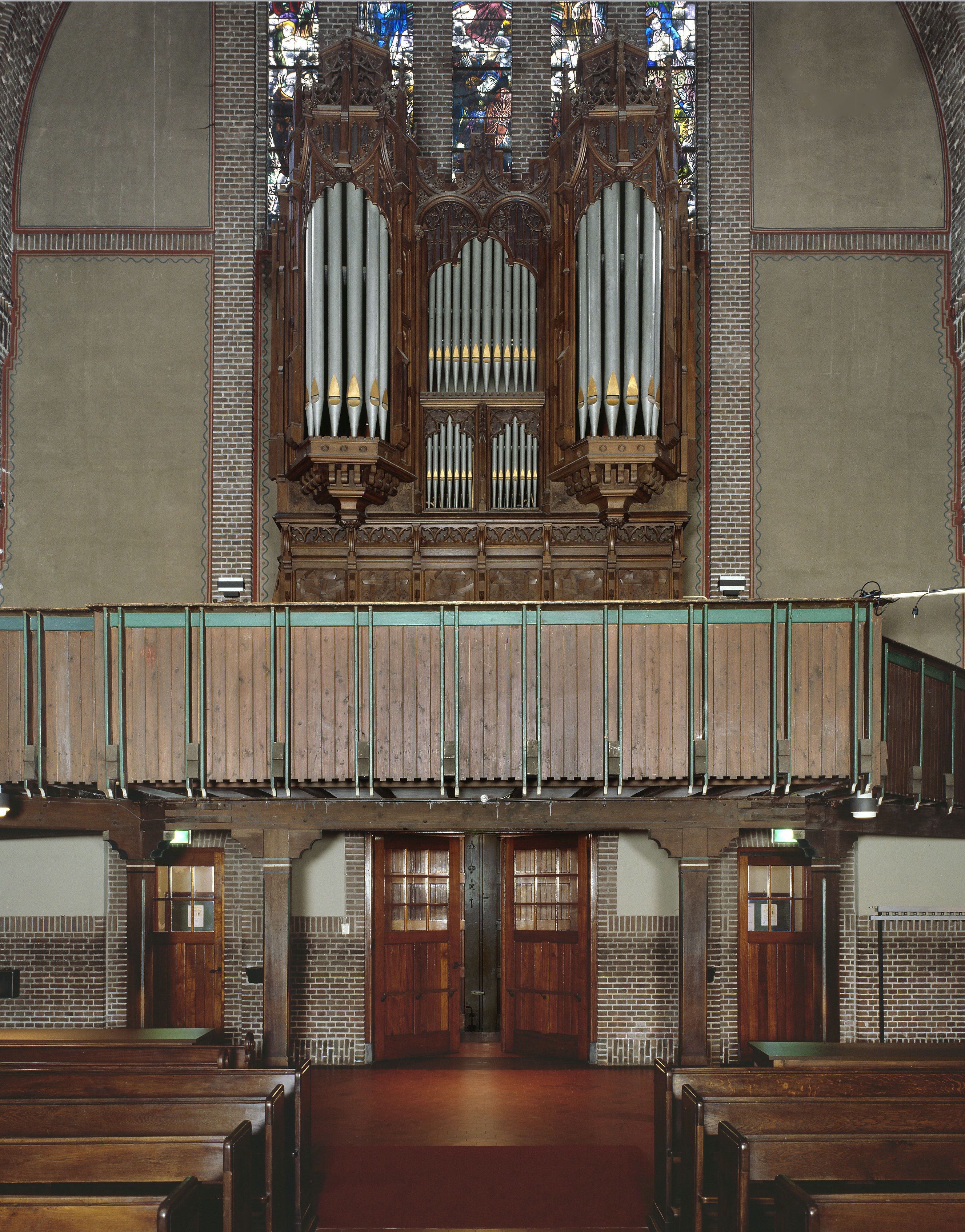 Sint Laurentius: Interieur, aanzicht orgel, orgelnummer 2017 (opmerking: Gefotografeerd voor Het Historische Orgel in Nederland 1878-1886, Bladzijde 208)